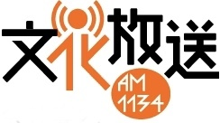 文化放送の2006年〜2015年まで使われたロゴ